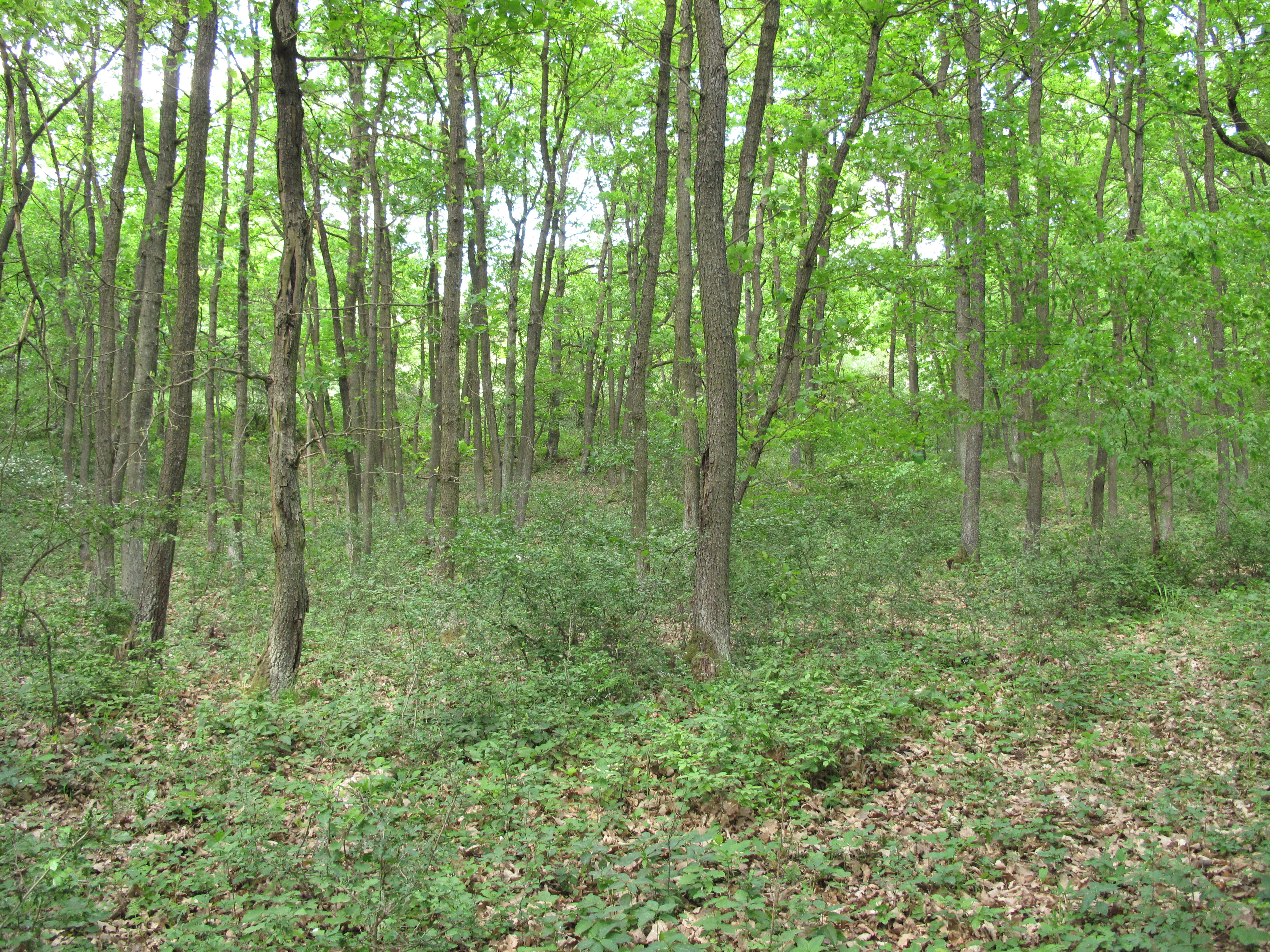 Přírodní rezervace Na Voskopě. Okres Beroun, Česká republika.